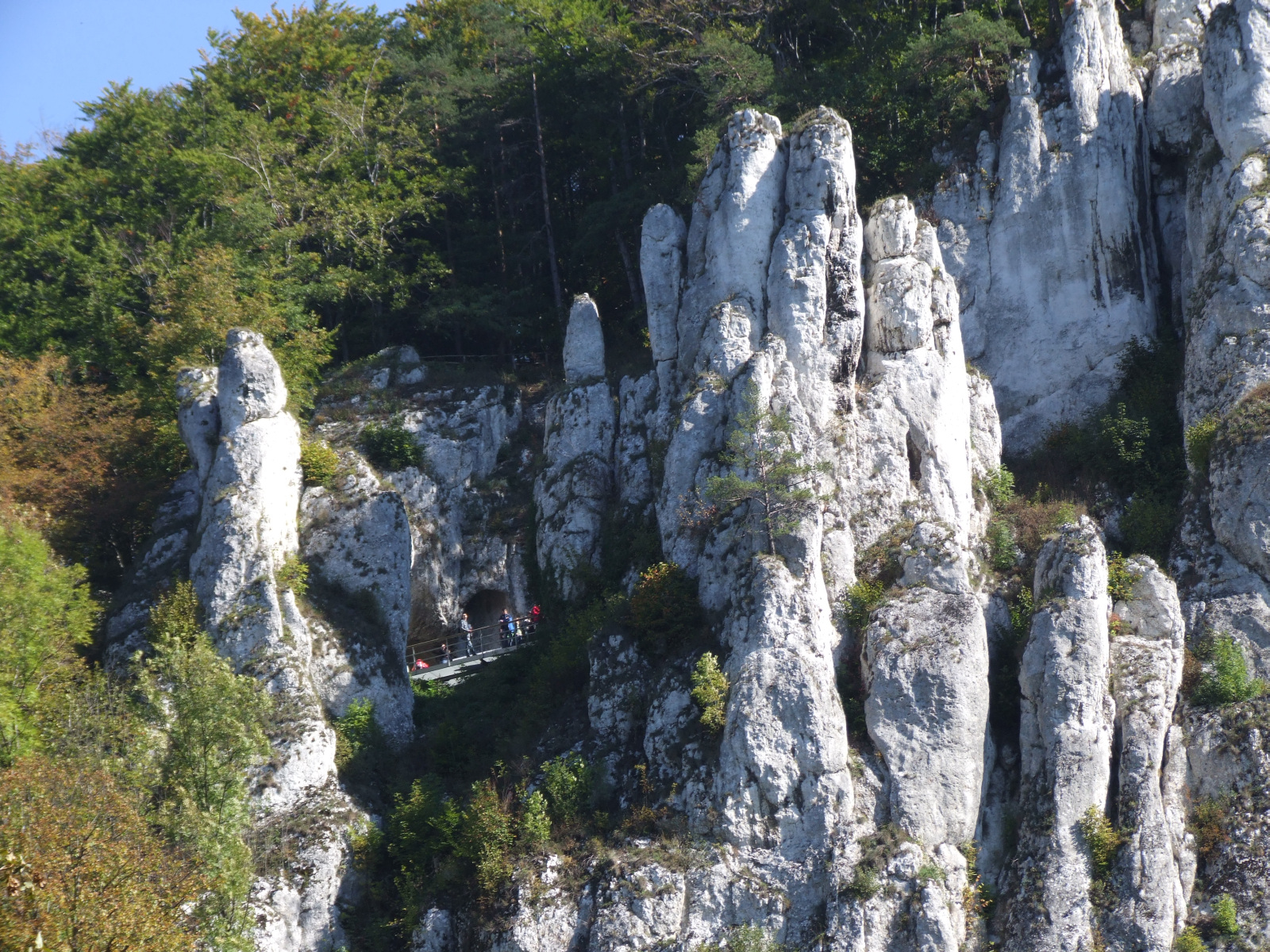 Biała Ręka- Dolina Prądnika (Ojcowski Park Narodowy)